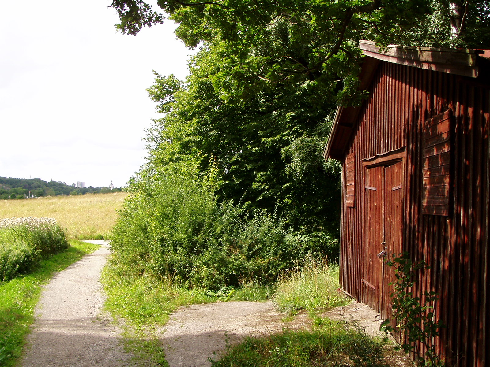 Lada Gärdet, Stockholm, Sweden 2005-08-06 öster om Borgen